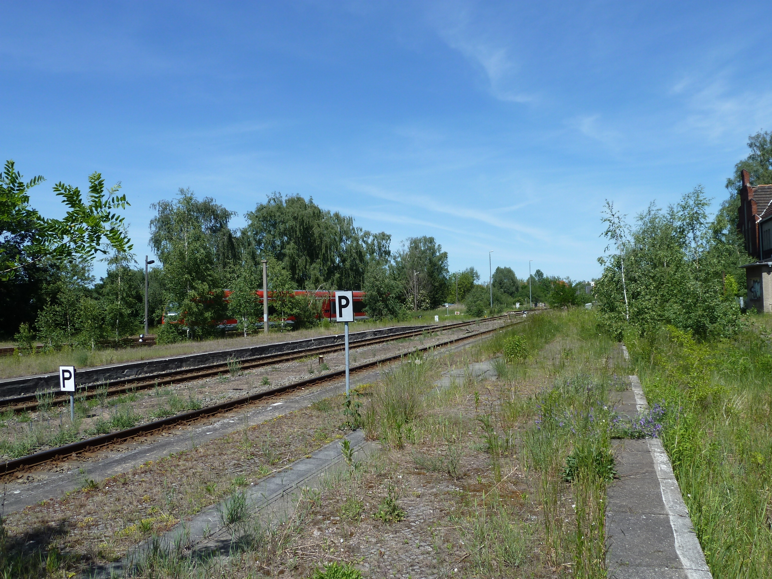 früherer Hauptbahnhof Neuruppin, Bahnsteige